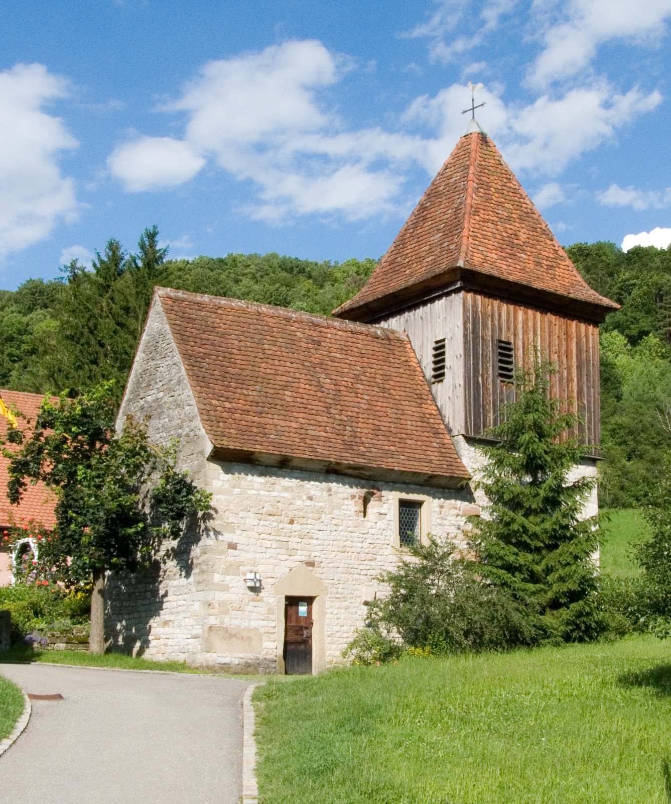 Allerheiligen-Kapelle, Unterscheffach, Germany